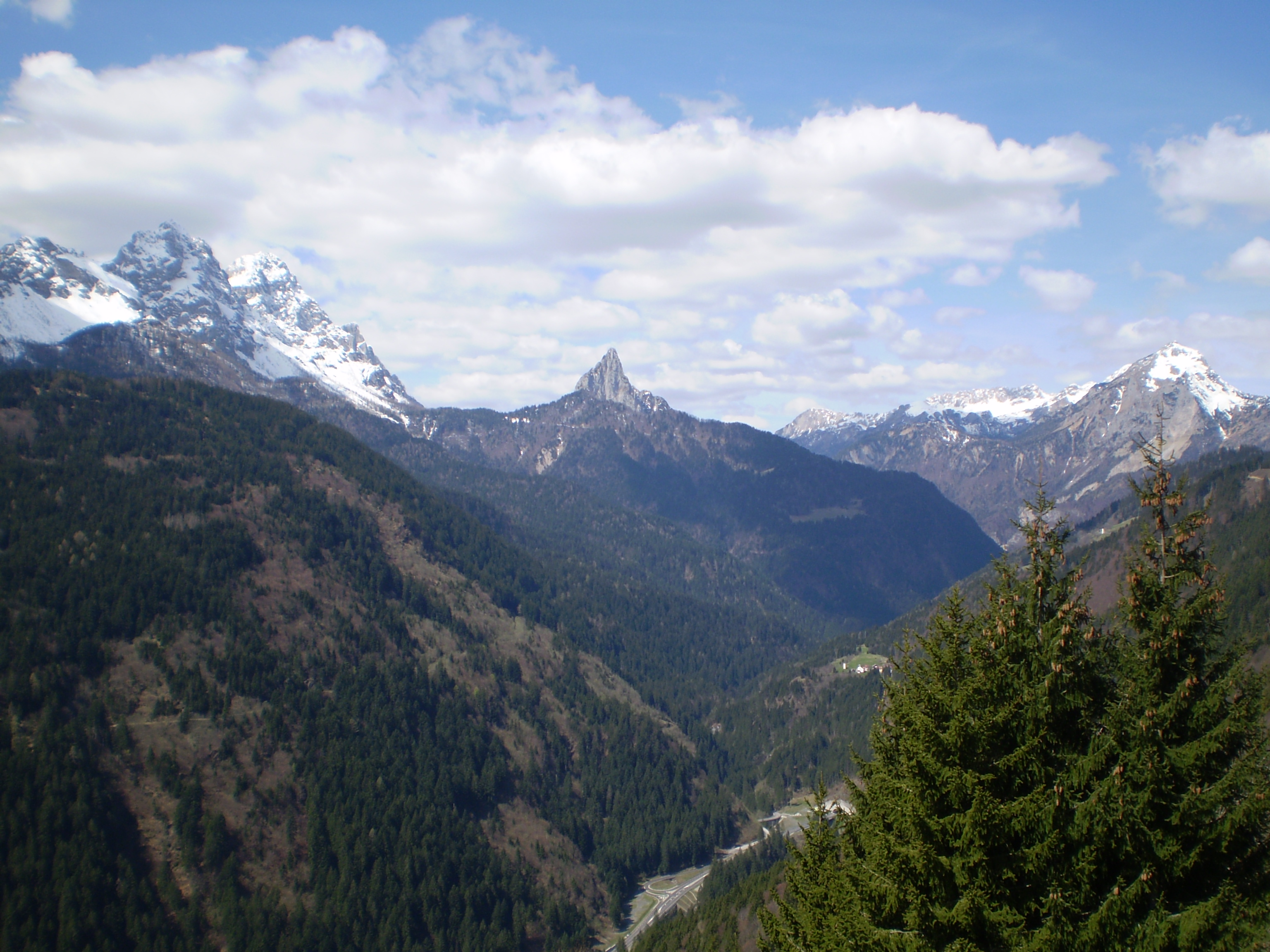 Veduta primaverile dell'alta val Degano da Givigliana, Carnia, Friuli